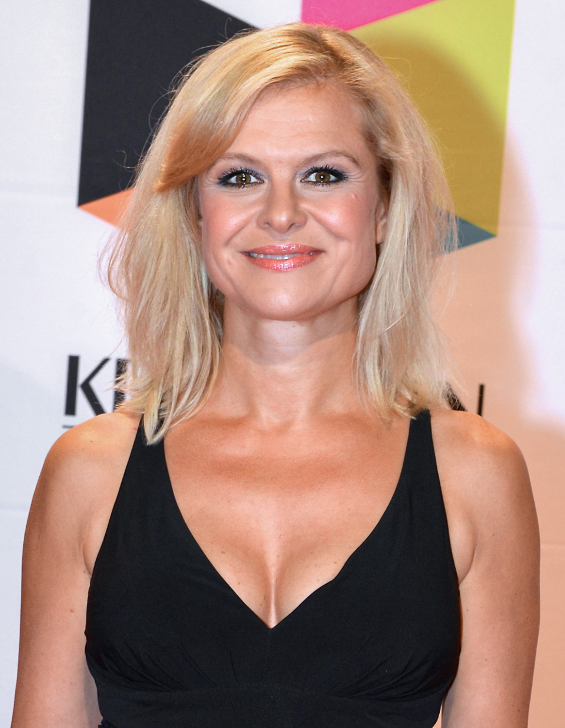 Ulrika Nilsson på Kristallen-galan den 30 september 2013.